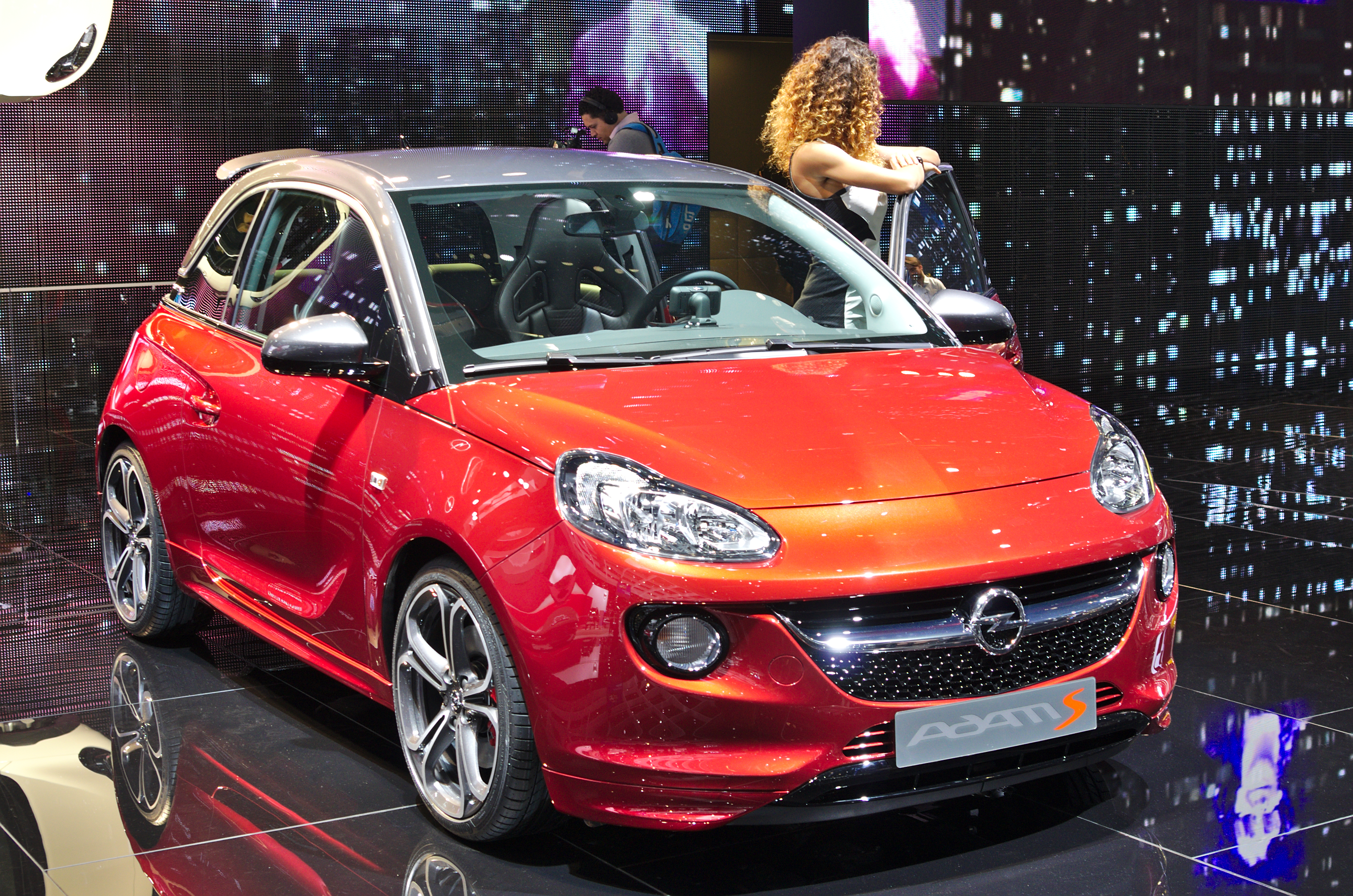 Salon de l'auto de Genève 2014 - 20140305 - Opel